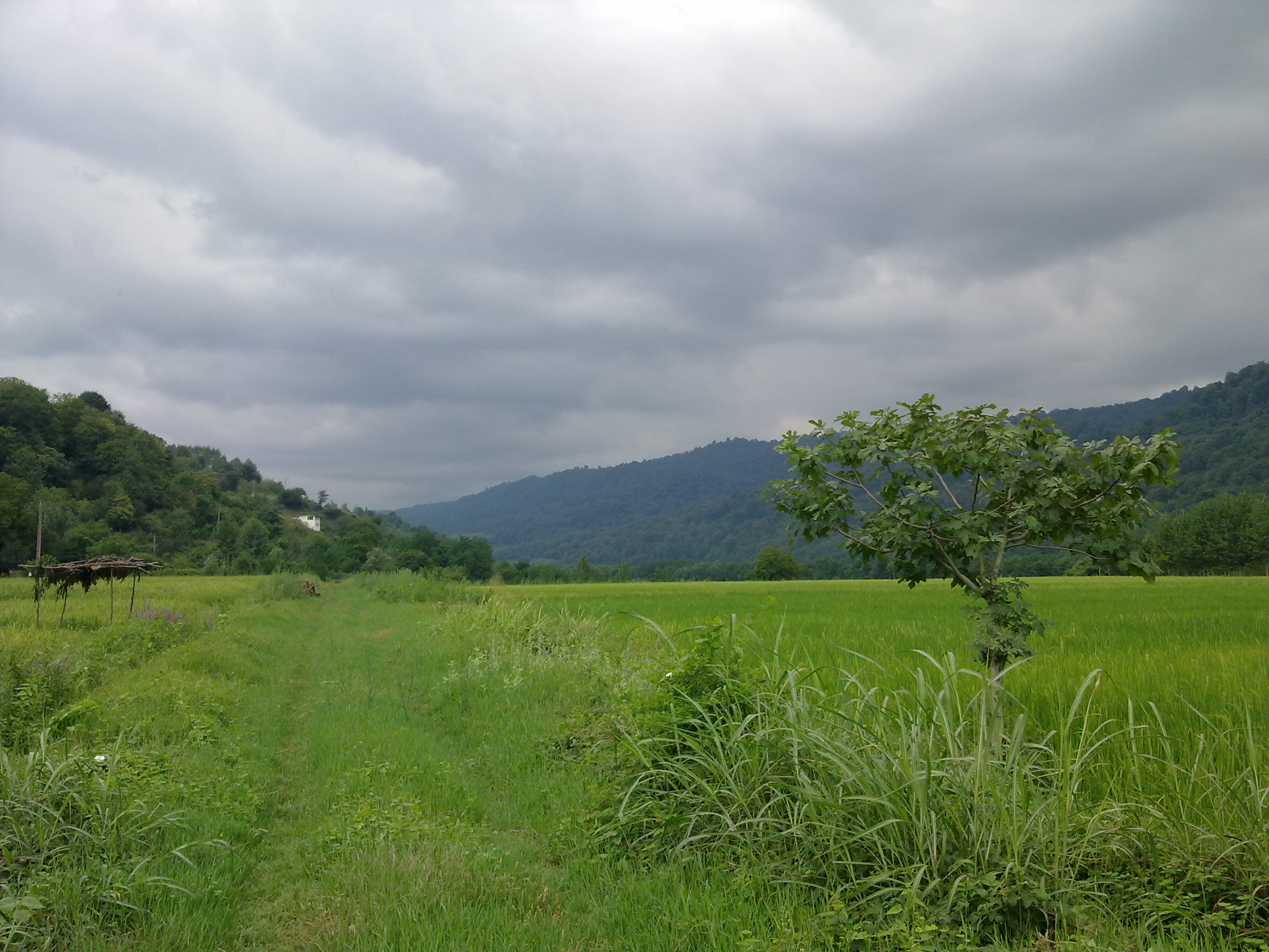 Ahoudasht-Sari-Mazandaran-Iran